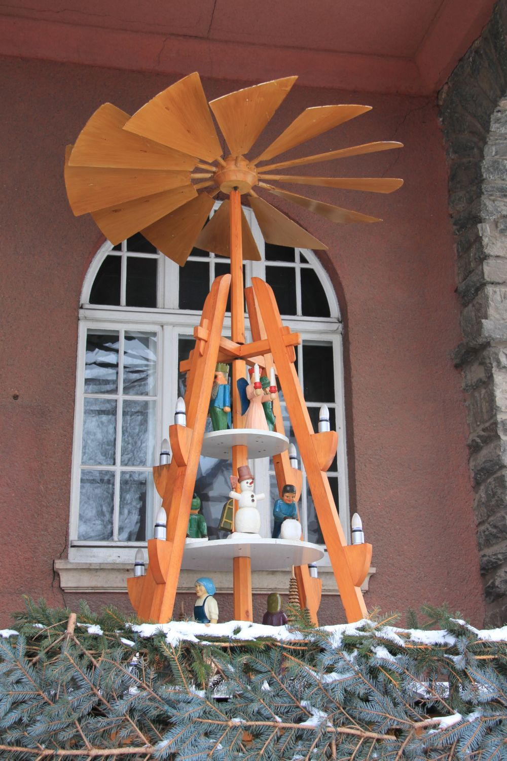 Ortspyramide in Meinersdorf